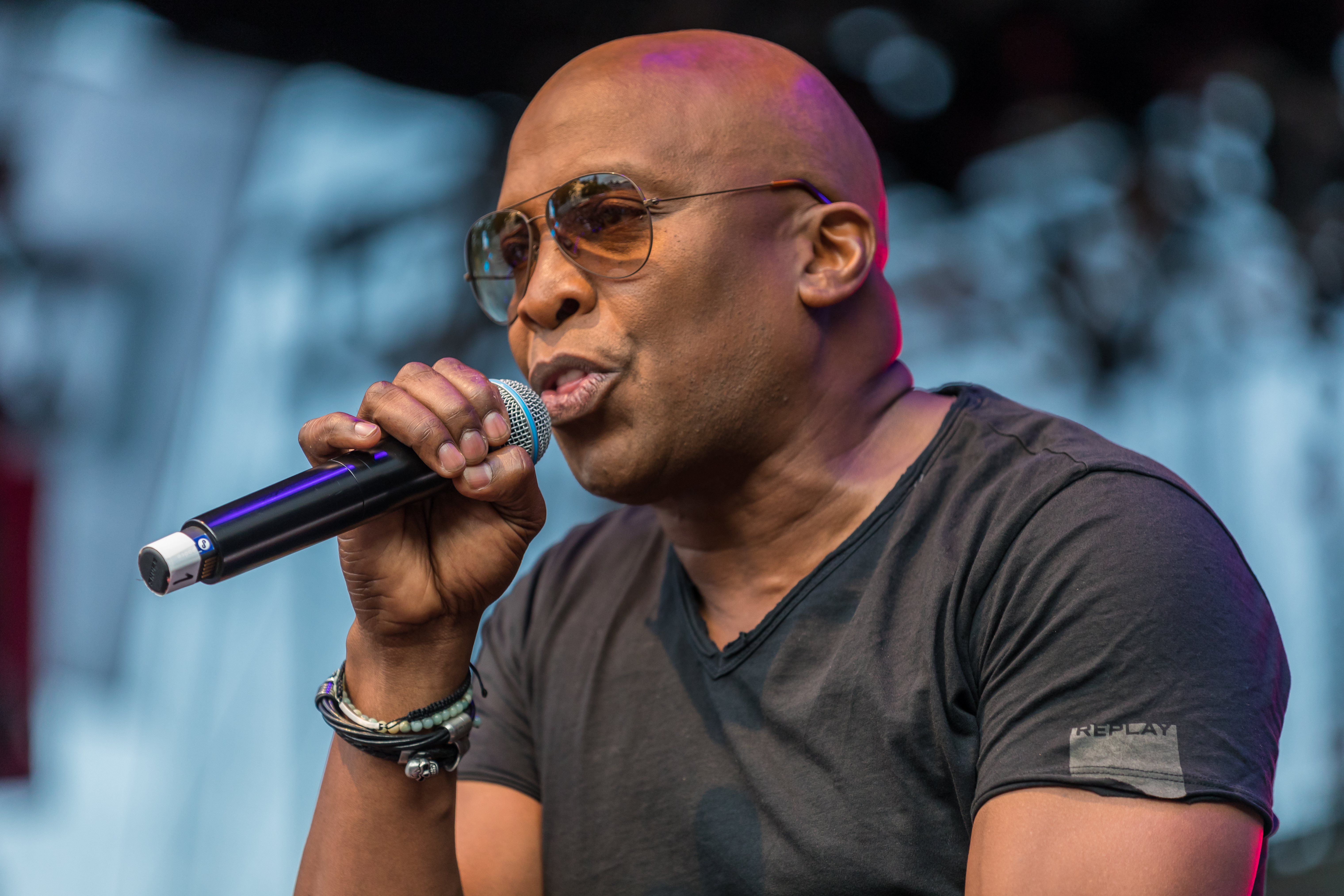 ColognePride 2019-Sonntag-Hauptbühne-2038-Haddaway und Dinah Nah